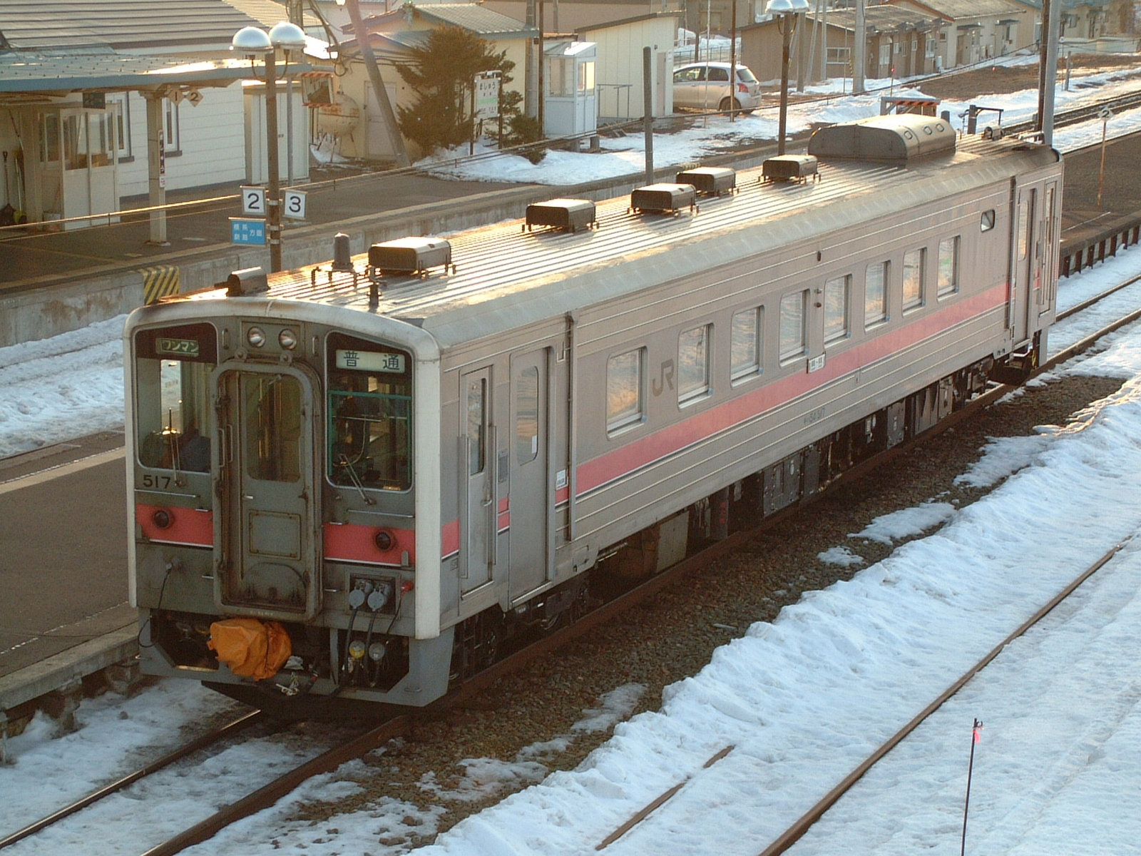 JR北海道キハ54形気動車（キハ54 517）JR北海道釧網本線摩周駅で撮影